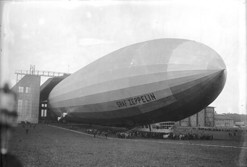 Erster Flug des neuerbauten Luftschiffes "Graf Zeppelin" in Friedrichshafen a/Bodensee! Der Riesen-Kolloss "Graf Zeppelin" wird aus der Luftschiffhalle in Friedrichshafen zum Start herausgeschleppt.